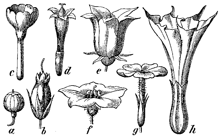 Slika 12. Pravilni, nerazločeno-listni cvetni venci.